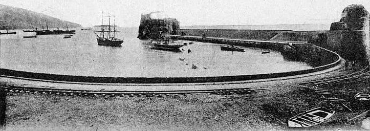 Ferrovia no Porto do Funchal, nos fins do séc. XIX. Forte de São José à direita na foto, e na ponta do molhe o Ilhéu de Nª. Sª. da Conceição